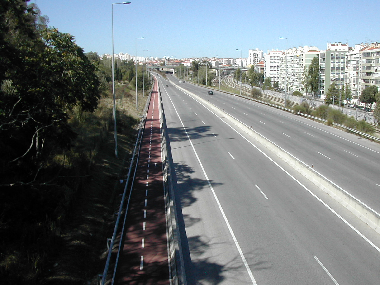 Radial de Benfica visto para ocidente a partir do viaduto pedonal do Calhariz de Benfica